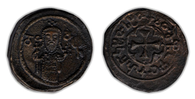 დავით აღმაშენებლის მონეტა, მოჭრილი სავარაუდოდ, 1118-1125 წლებში. სპილენძი 10,73 გრ. 33 მმ., ბრიტანეთის მუზეუმი, ლონდონი